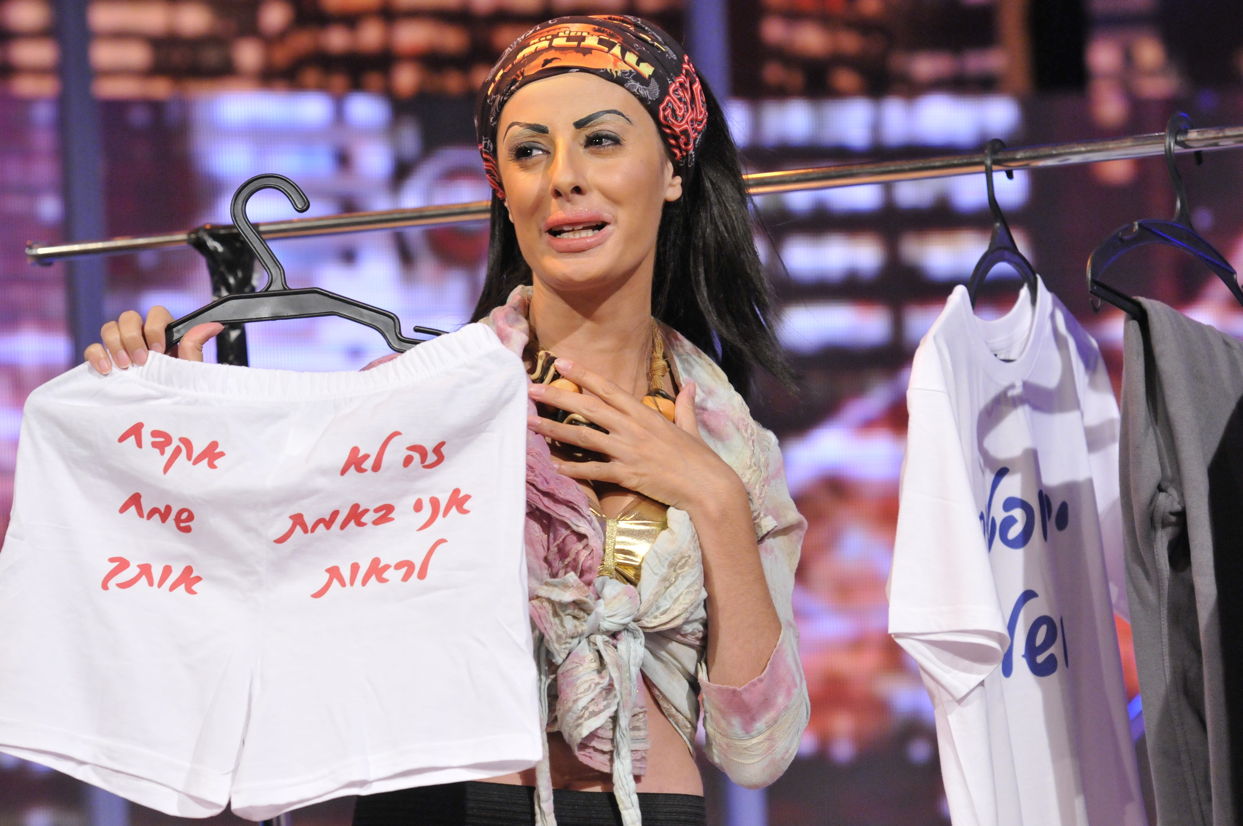 יפית אסולין כאירית רחמים מתוך "נבחרת ישראל בטלויזיה"